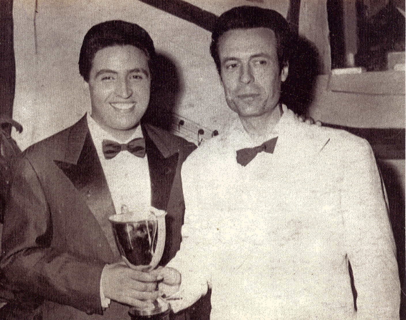 Autore della foto: Mario Trevi. La fonte è lo stesso signor Trevi, che me l'ha fornita. Raffigura Mario Trevi e Salvatore Mazzocco nel 1961 al Giugno Canoro della Canzone Napoletana. Premiazione per il secondo posto della canzone Mare verde.